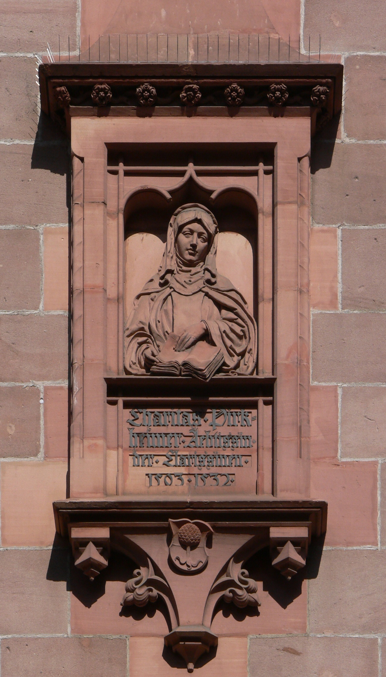 de=Nürnberg, Haus Königstraße 70/Ecke Luitpoldstraße (hier: Fassade zur Luitpoldstraße), an der Stelle des ehemaligen Klarissenklosters; Gedenkstein für Äbtissin Cariats Pirckheimer. en=Caritas Pirckheimer (born 21 March 1467, Eichstätt - died 19 August 1532, Nuremberg) was Abbess of Saint Clara's convent in Nuremberg.